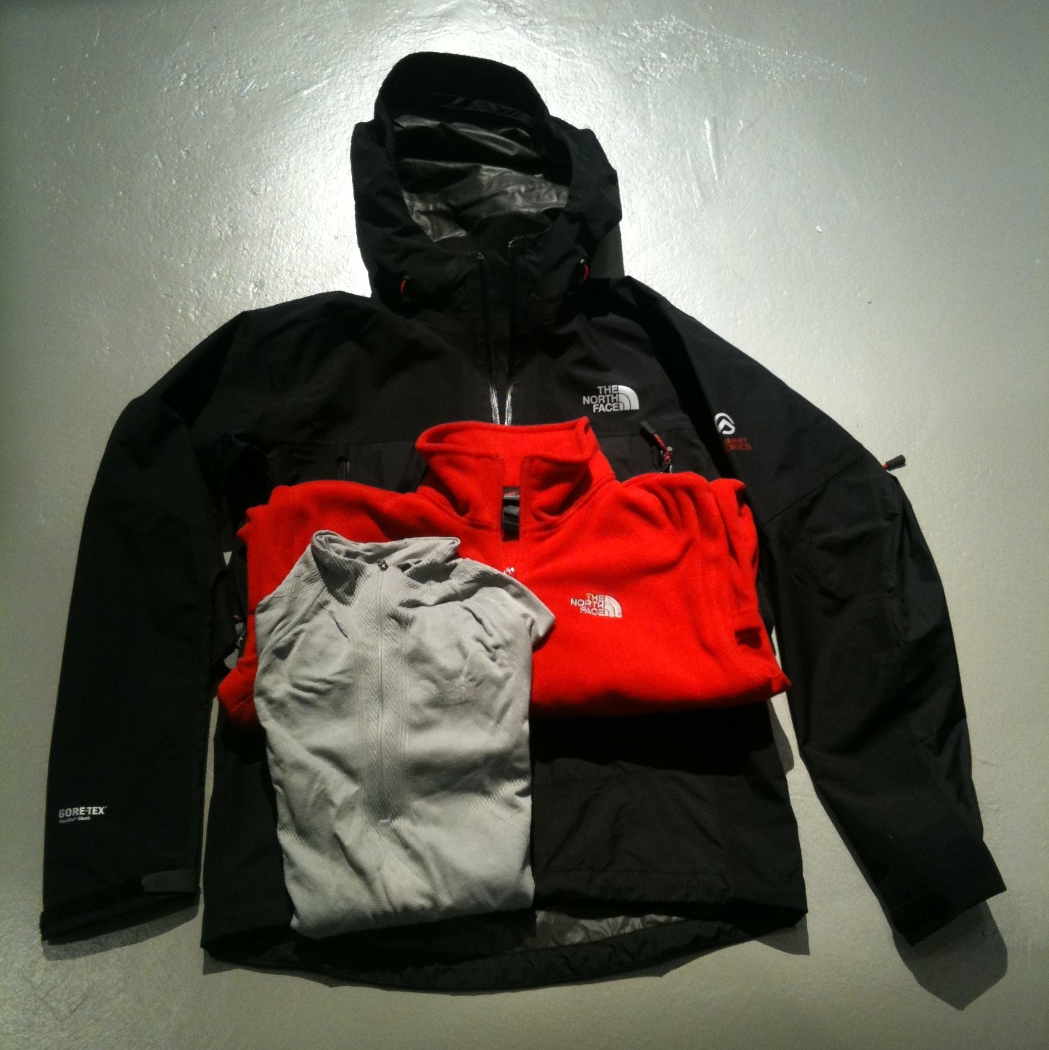 Außenschicht (Shell), Mittlere Schicht (Fleece), Innere Schicht (Funktions-Shirt)